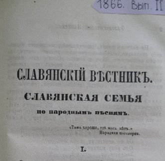 Воронежский "Славянский вестник"